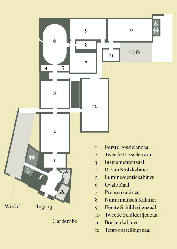 Plattegrond van Teylers Museum, Haarlem.